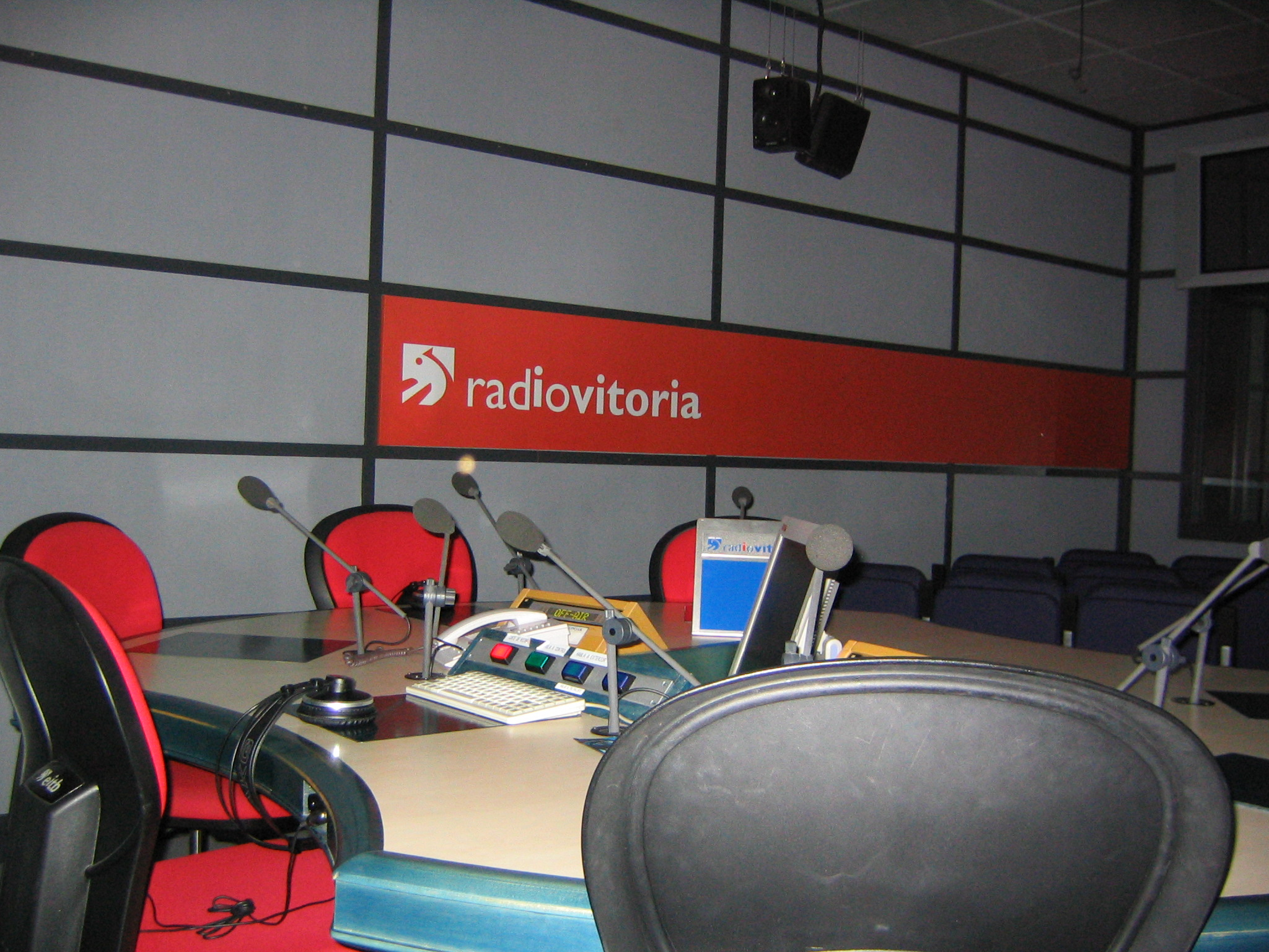 Radio Vitoria en Vitoria, Álava, País Vasco, España.